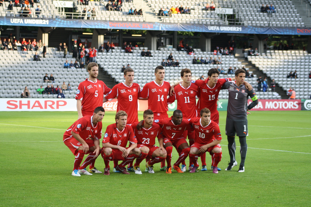 Devant, de gauche à droite: Philippe Koch, Fabian Lustenberger, Gaetano Berardi, Innocent Emeghara et Xherdan Shaqiri; derrière, de gauche à droite: Jonathan Rossini, Fabian Frei, Granit Xhaka, Admir Mehmedi, Timm Klose et Yann Sommer